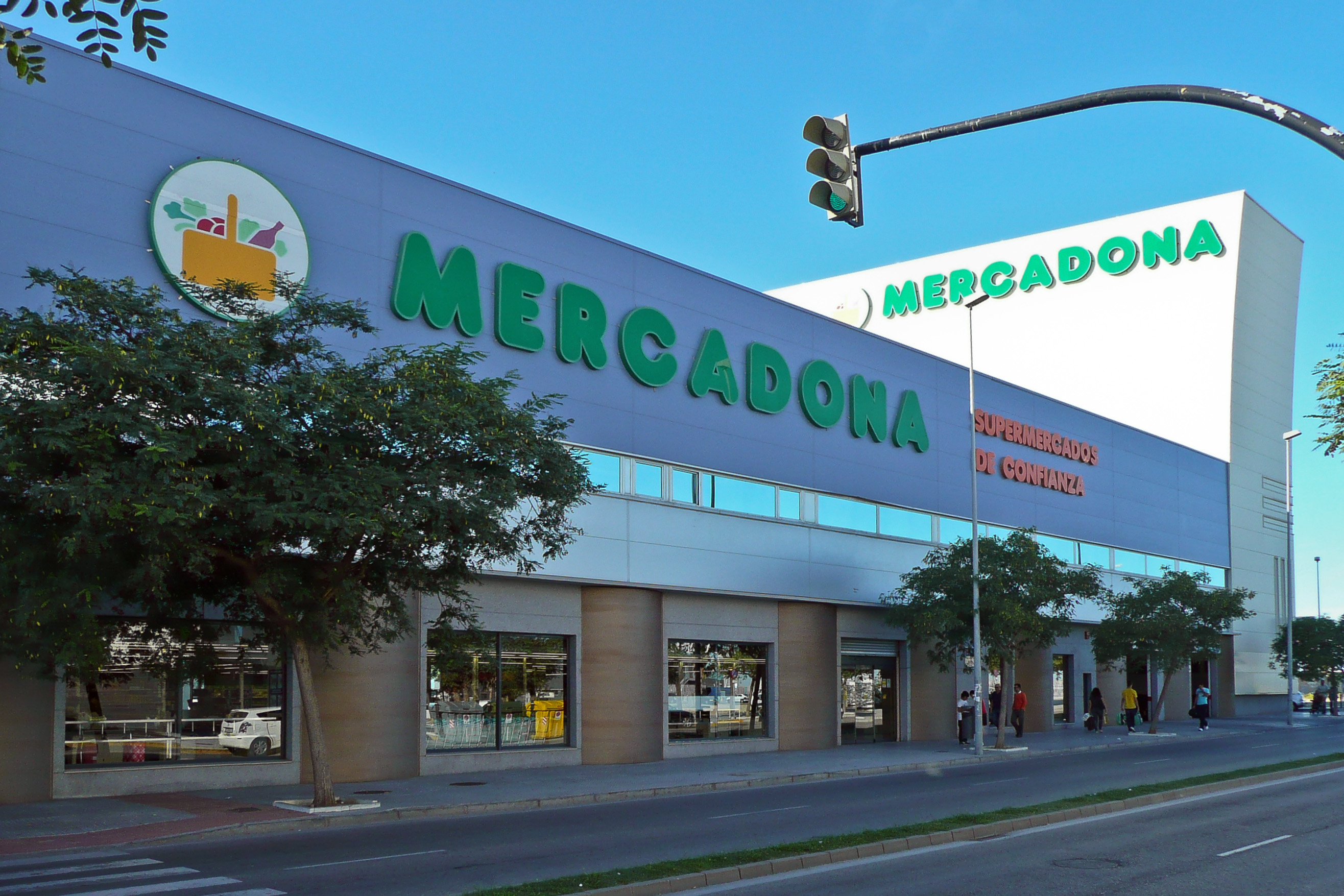 Mercadona-Filiale in Cádiz